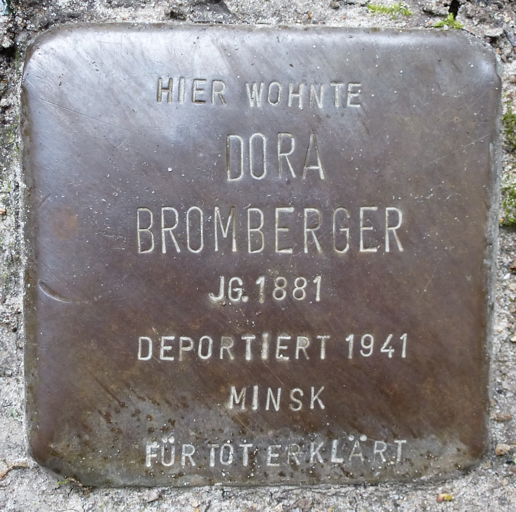 Stolperstein HB-Contrescarpe 93: Dora Bromberga *1881